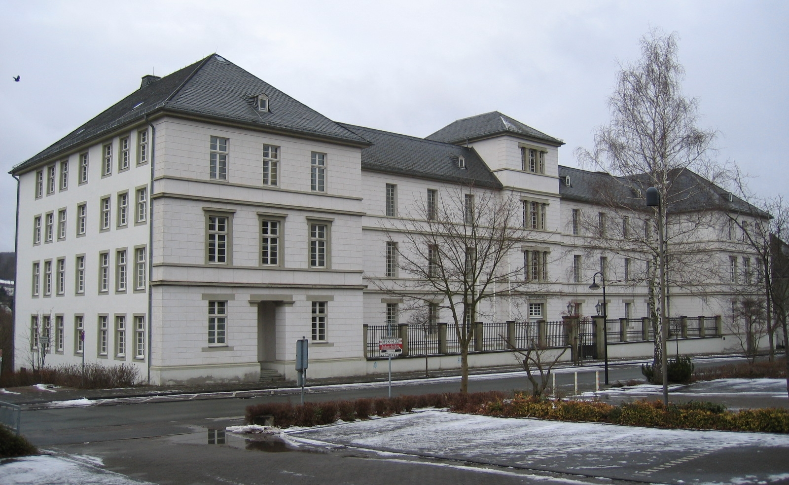 Amtsgericht Arnsberg in Arnsberg, geschossen vom Parkplatz des Kreishauses